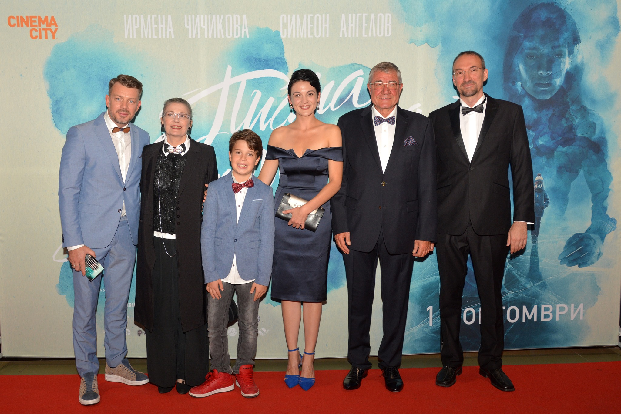 Prof. Christo Pimpirev na premierata na filma "Pisma ot Antarktida"